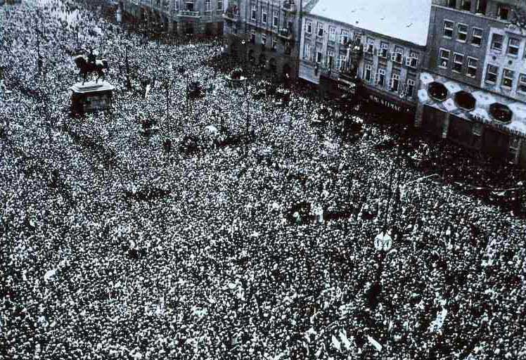 Miting oslobođenja grada i zemlje, trg bana Josipa Jelačića, 11. Svibnja 1945.